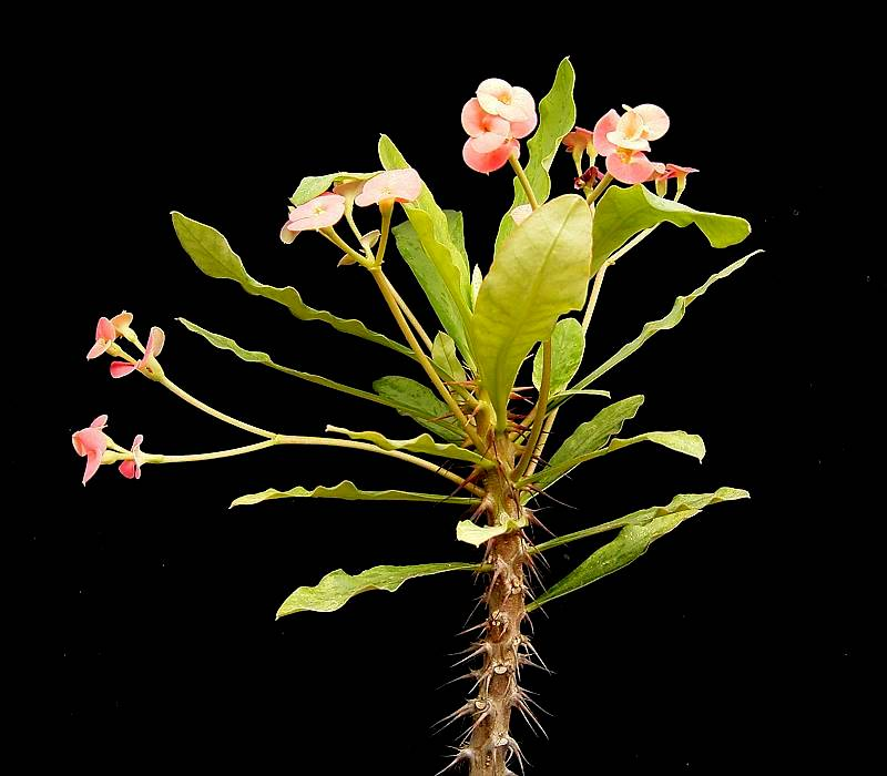 Euphorbia 'Hawaii' (E. milii x E. moratii)